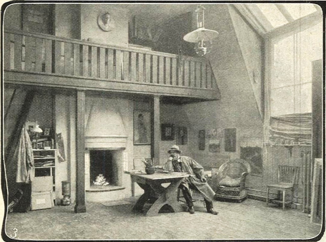 Villa Pauli, Georg Paulis ateljé